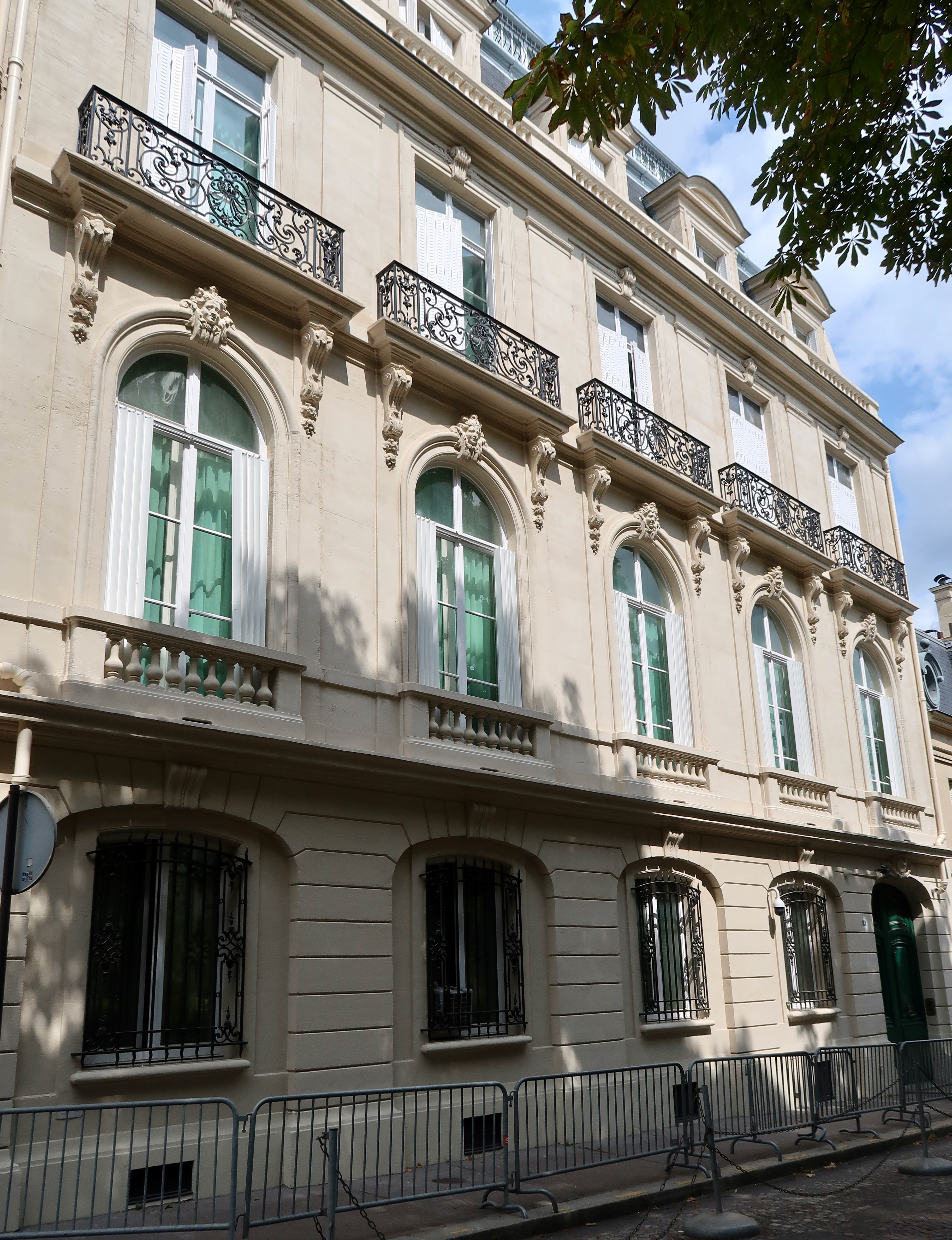 Hôtel Deutsch de la Meurthe, 4 place des États-Unis (Paris, 16e).